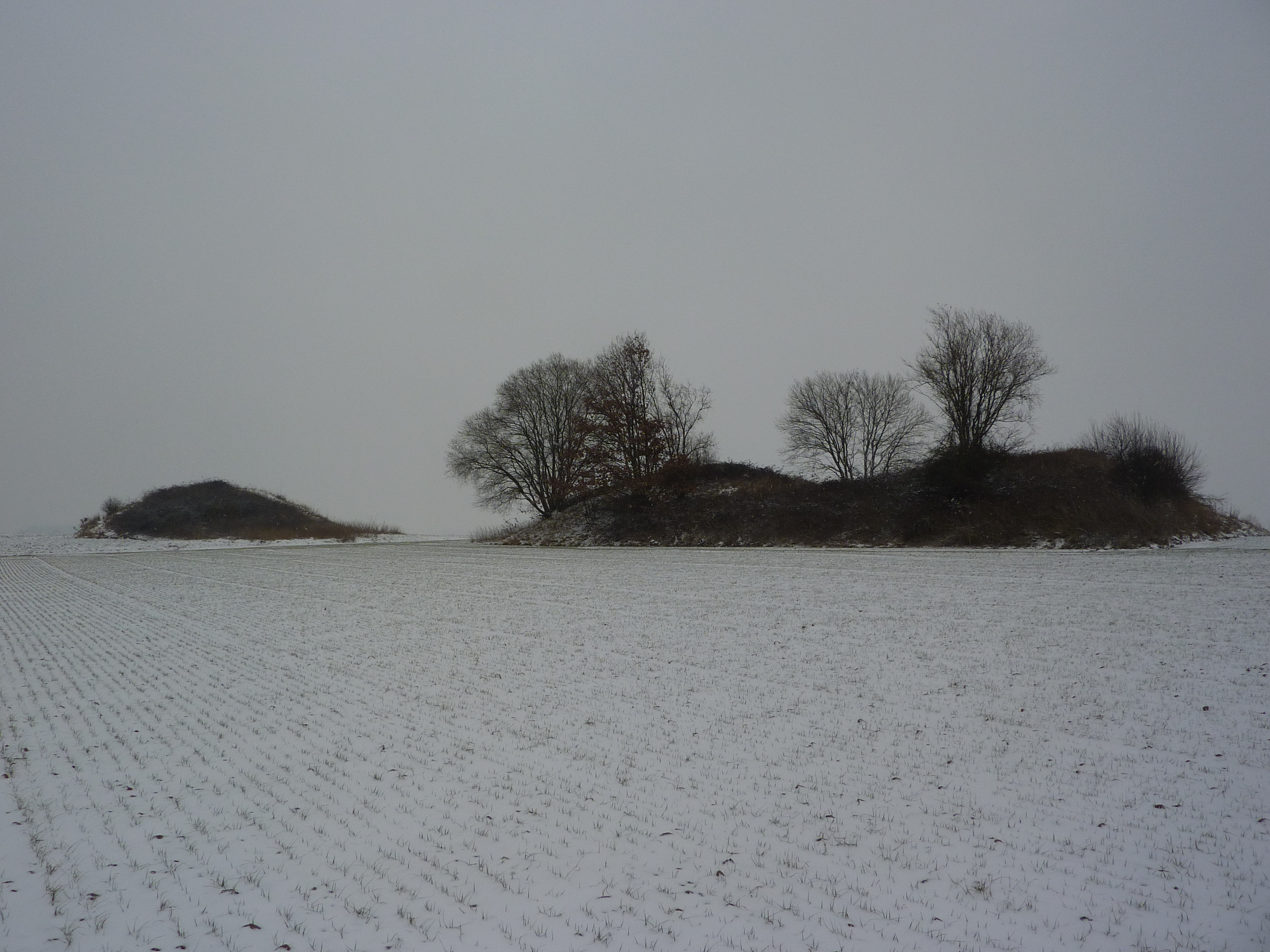 Les 3 tumuli de Séron à Fernelmont